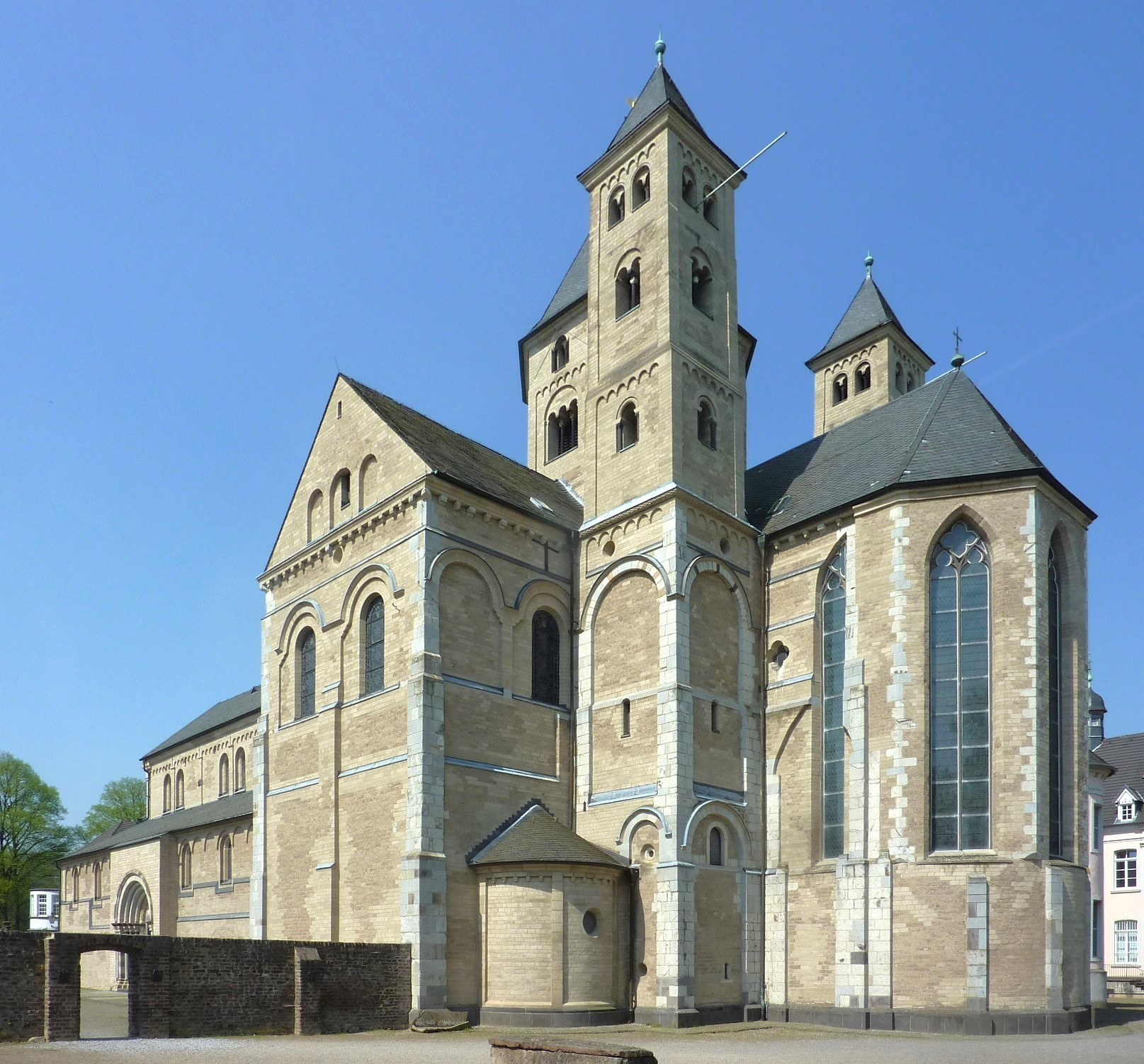 St. Maria Magdalena und St. Andreas (Knechtsteden)